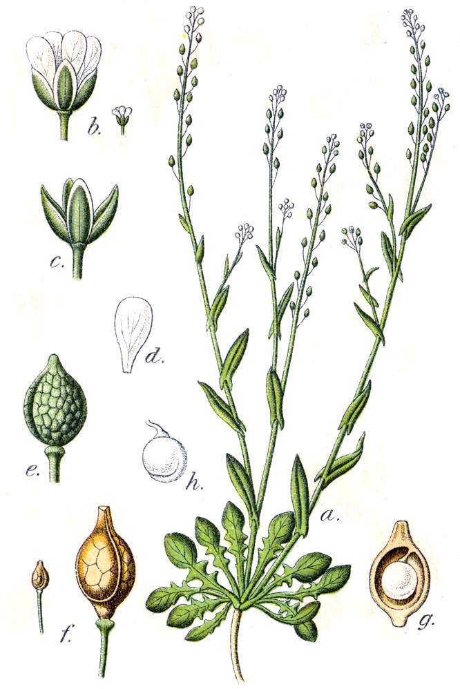 Calepina irregularis (Asso) Thell., syn. Calepina corvini All., Crucifera corvini (All.) E.H.L.Krause Original Caption Corvinus-Kreuzblume, Crucifera corvini